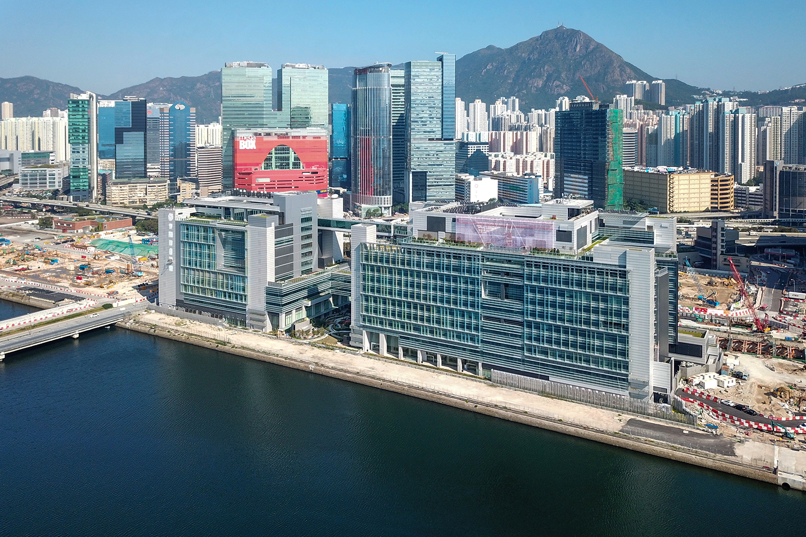 Hong Kong Children's Hospital